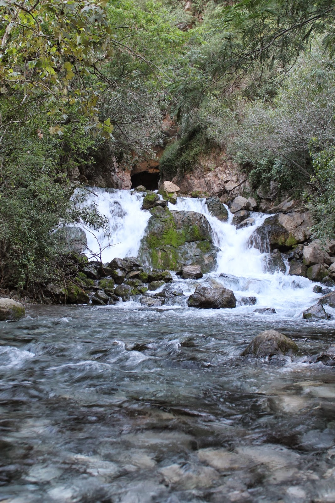 Volcán de Jaures, a un costado del Cañón de Santa Rosa, en la Sierra Madre Orientañ